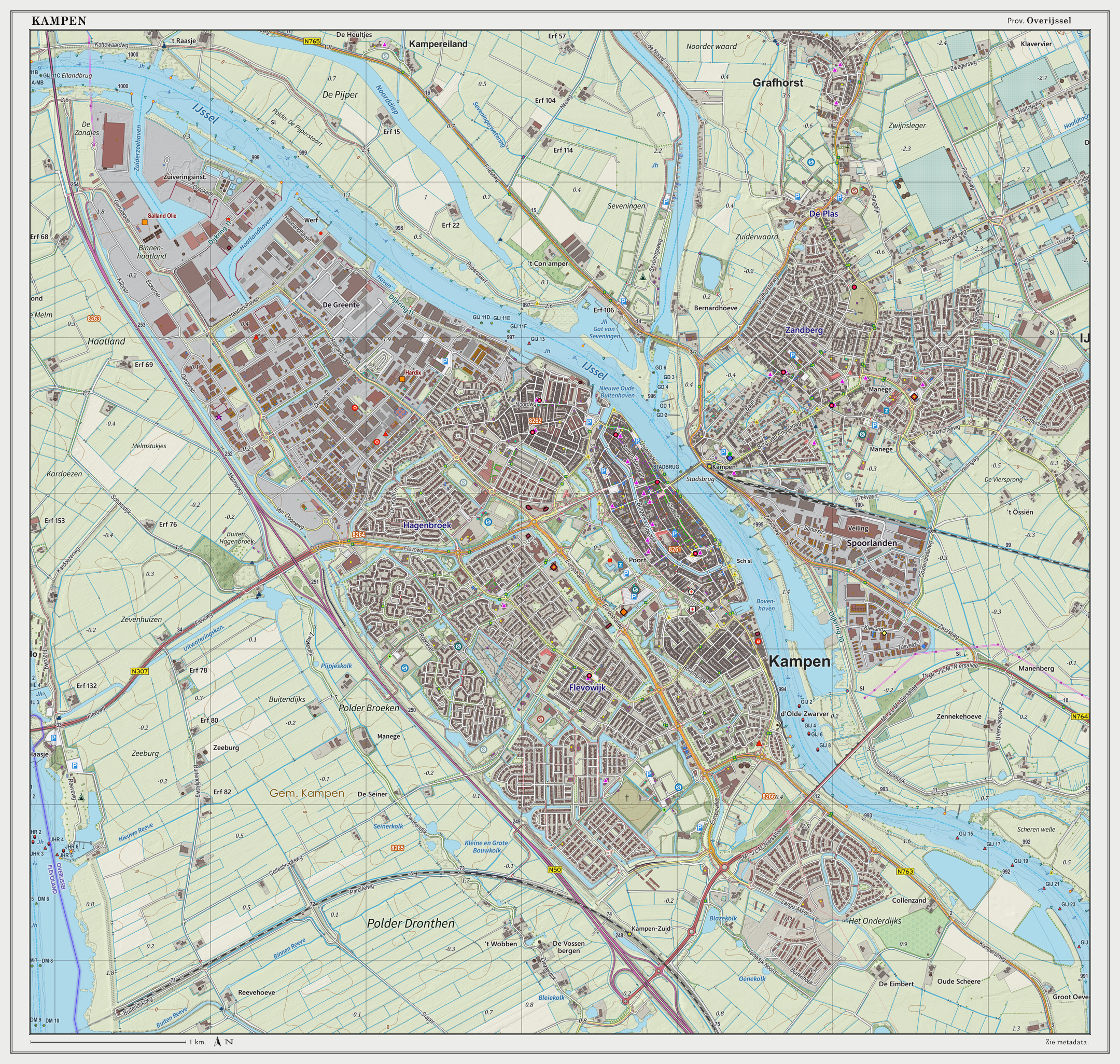 Topografische kaart van Kampen (woonplaats). Resolutie: 300 pixels/km. Kaartbeeld samengesteld uit de open geodata van de Top10NL en Top25namen (Basisregistratie Topografie, Kadaster), Creative Commons BY licentie. Gebouwvlakken uit open geodata BAG extract. Wegen uit de OpenStreetMap. Reliëfschaduw uit de Actuele Hoogtekaart AHN2. Samenstelling en kleurenschema: Jan-Willem van Aalst, met QGIS2. Zie ook de Legenda.